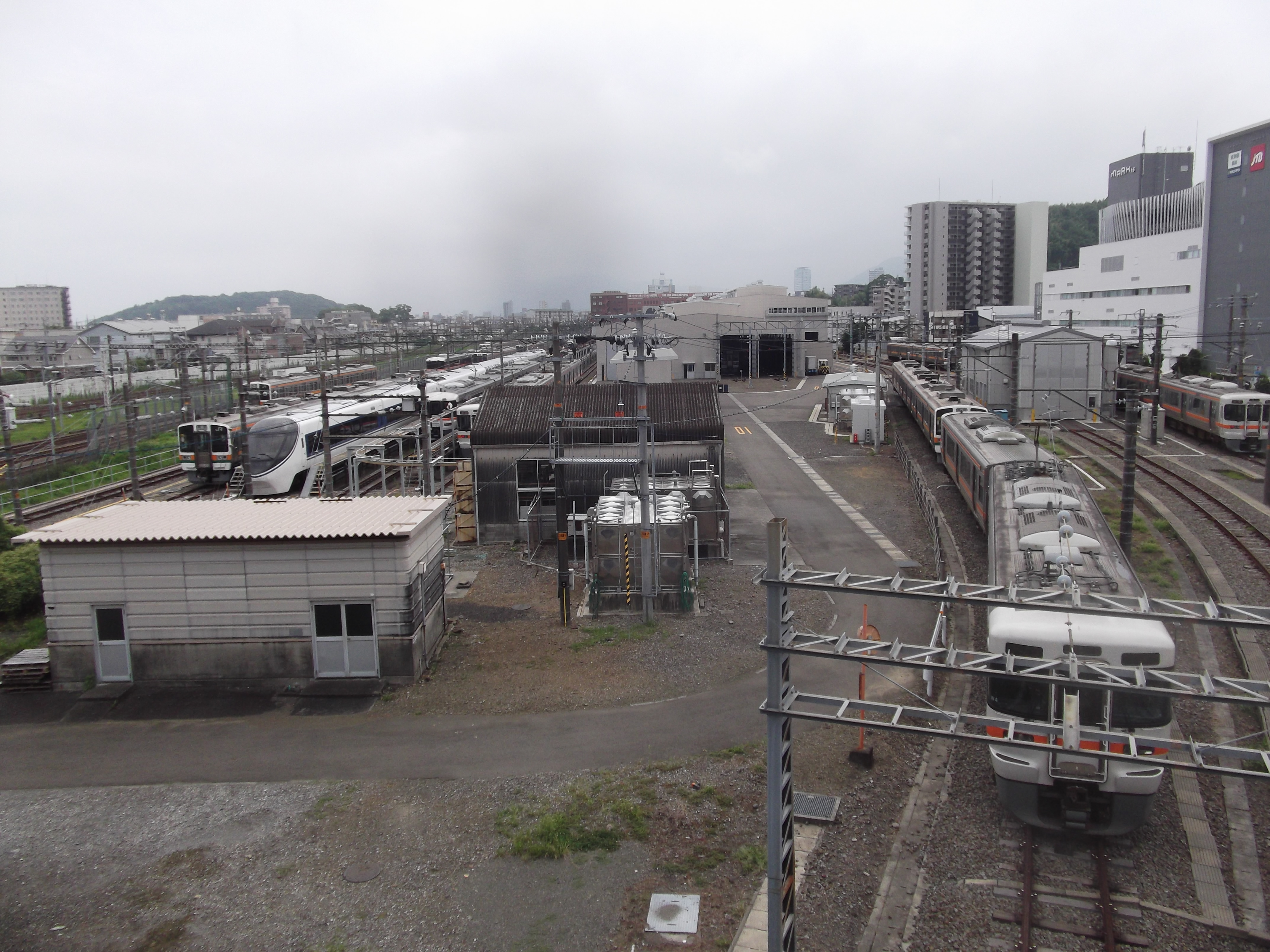 JR東海の静岡車両区。2014年8月14日撮影。